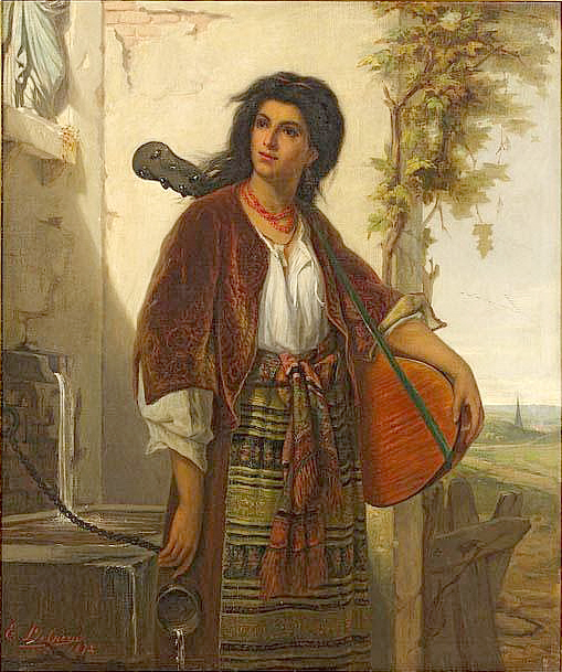 Musicienne espagnole portant sa guitare sur le dos